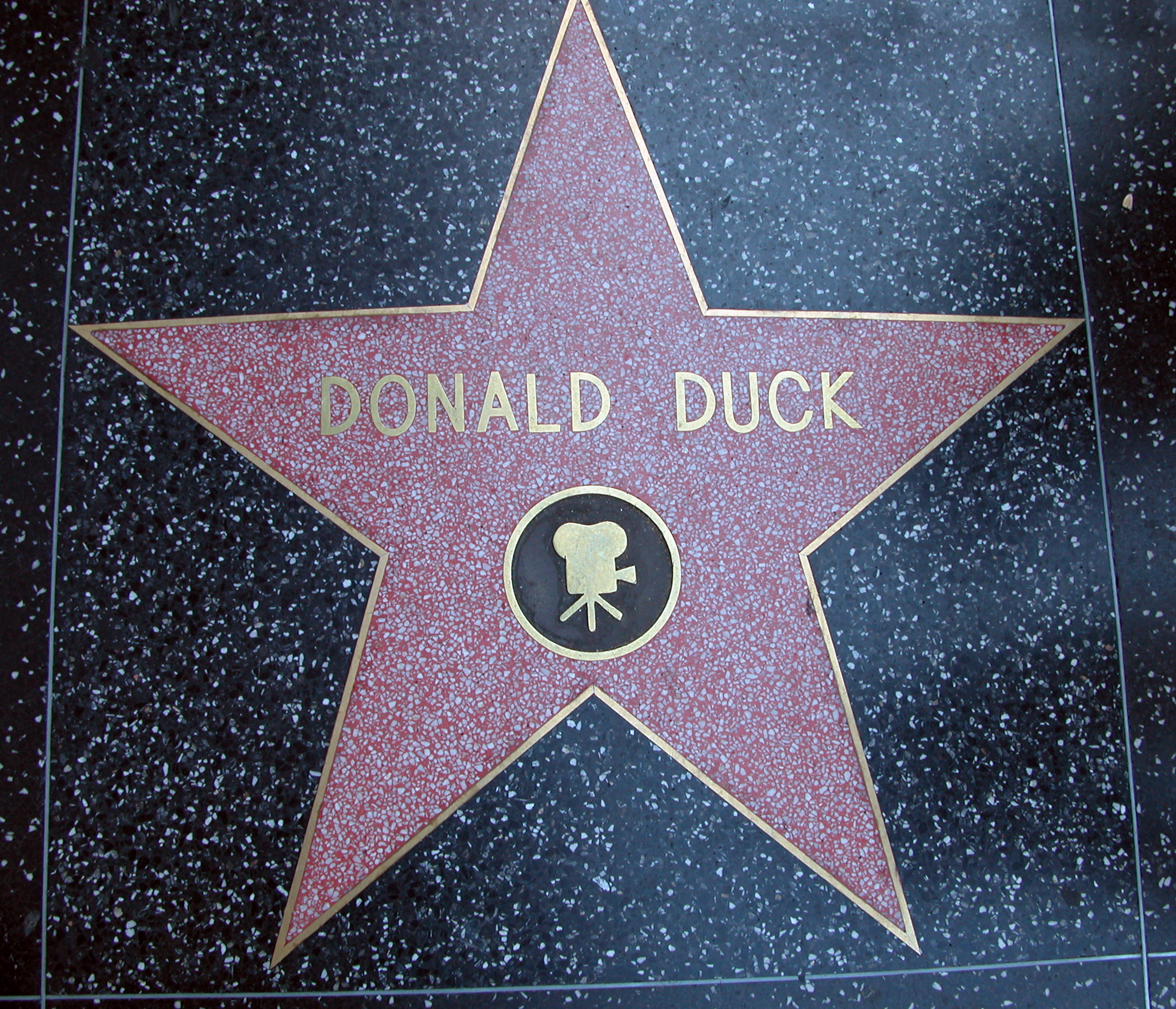 Foto taken by shaka